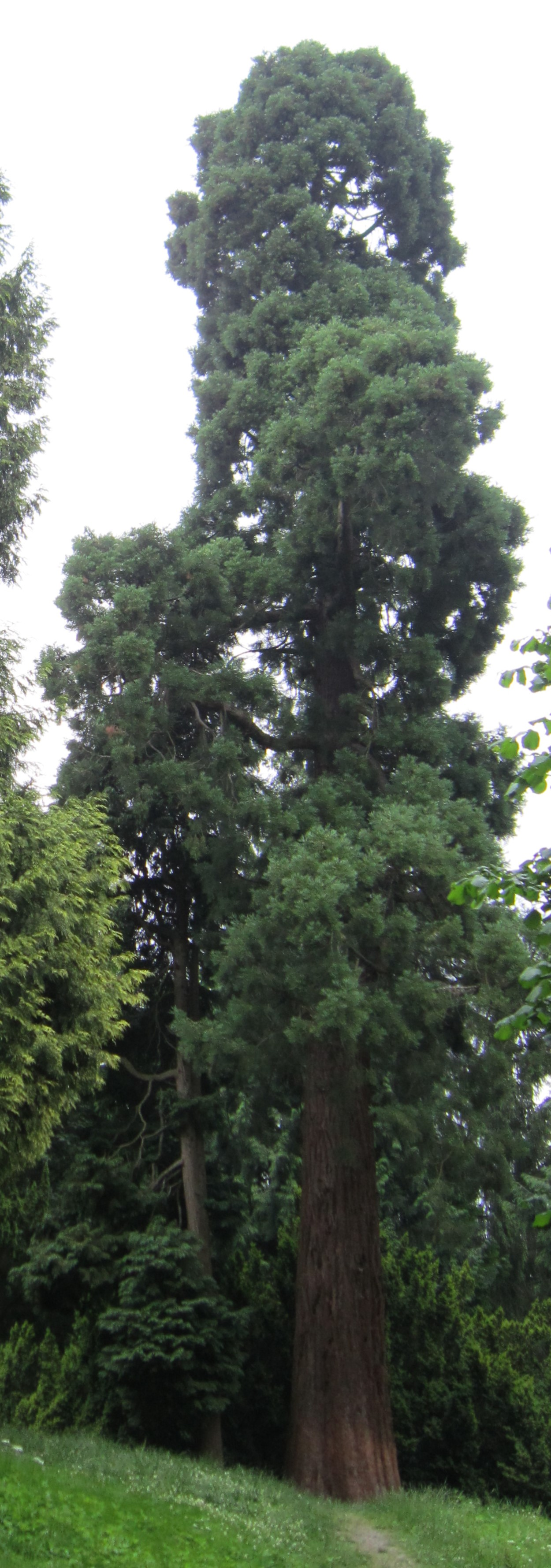 33 Meter hoher Mammutbaum im Arboretum Piesberg in Lechtingen (Gemeinde Wallenhorst bei Osnabrück)